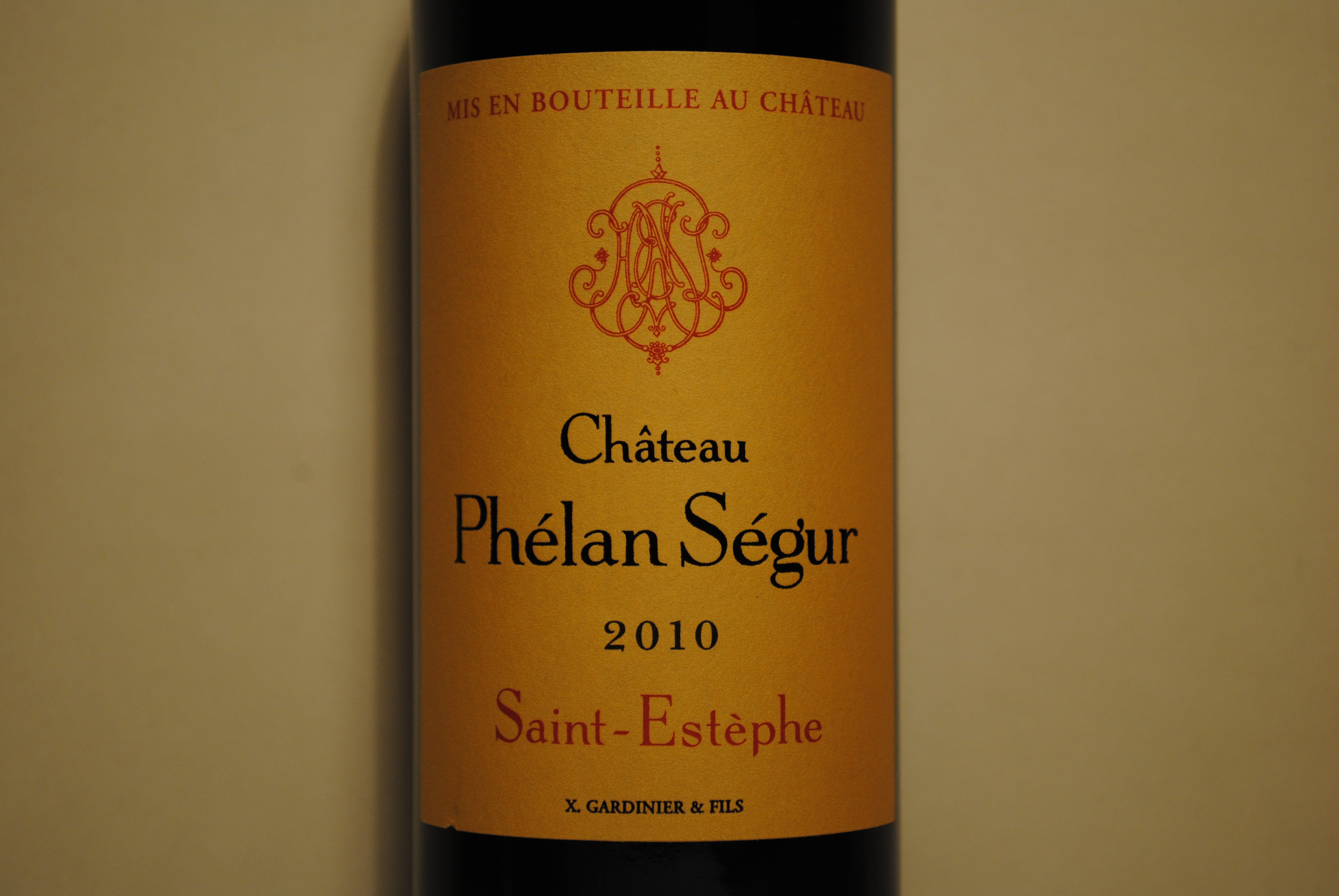 Etikette einer Flasche Château Phélan Ségur 2010